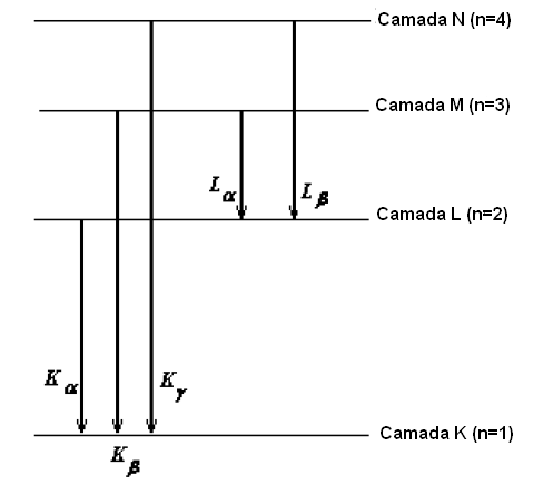 Transições de Raio-X sem a estrutura fina.